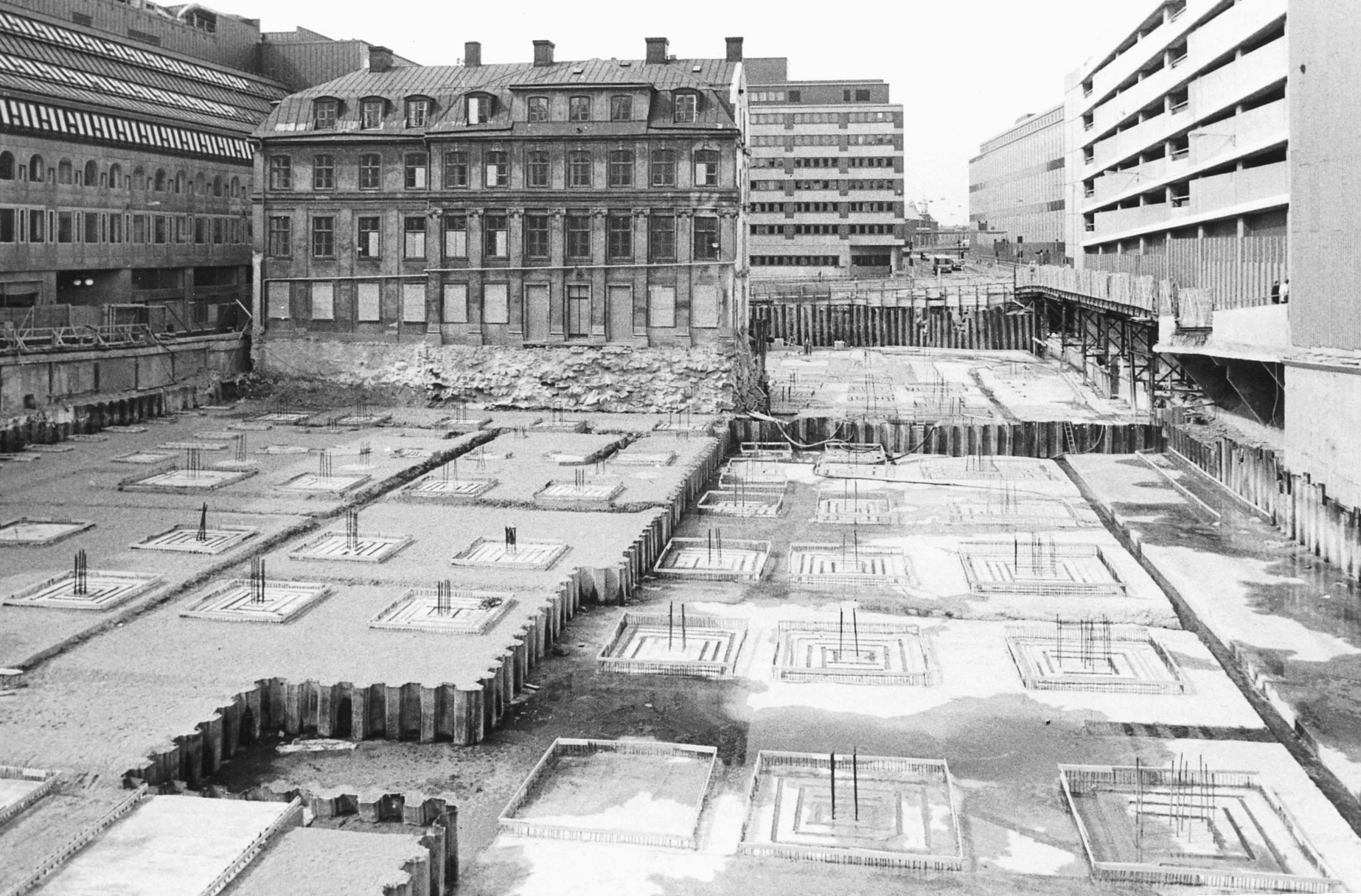 Adelcrantzska palatset och grundläggningsarbeten i kvarteret Björnen